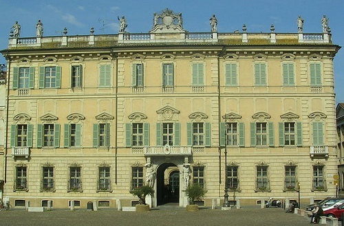 Palazzo Bianchi in Piazza Sordello a Mantova